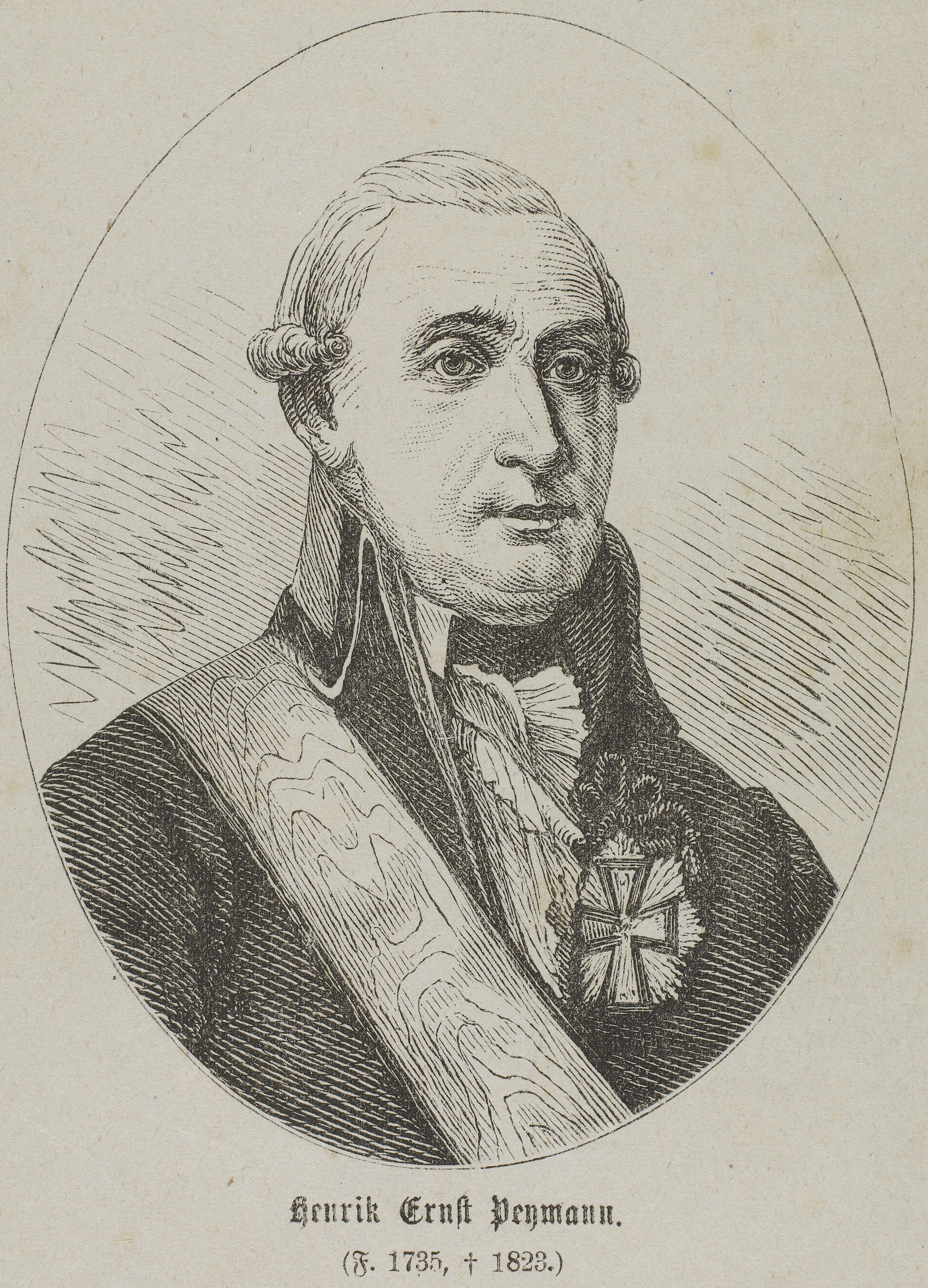 Henrik Ernst Peymann (22.05.1735 ell. 1737 - 28.01.1823), dansk officer